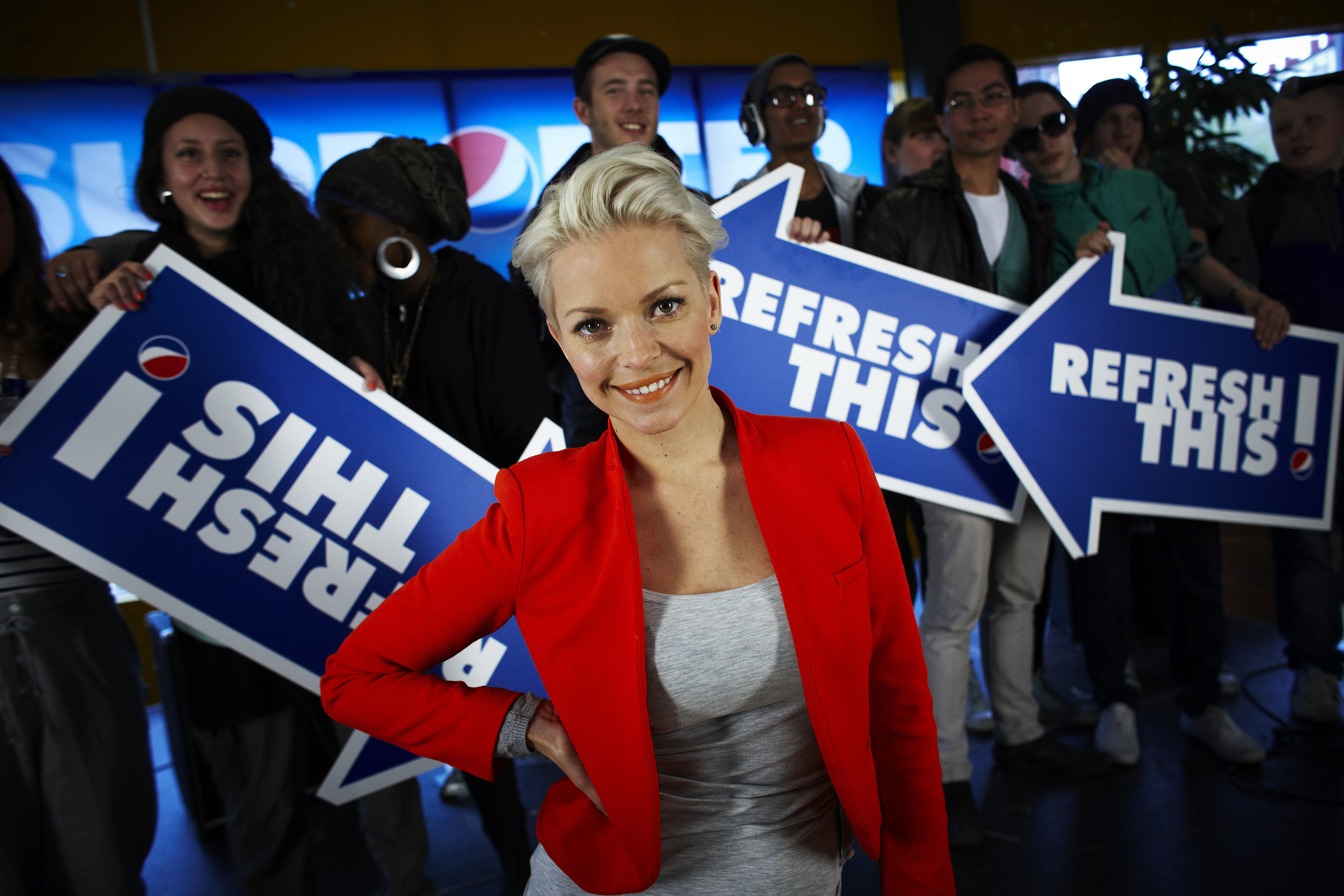 Petra Marklund i en reklamkampanj för Pepsi.